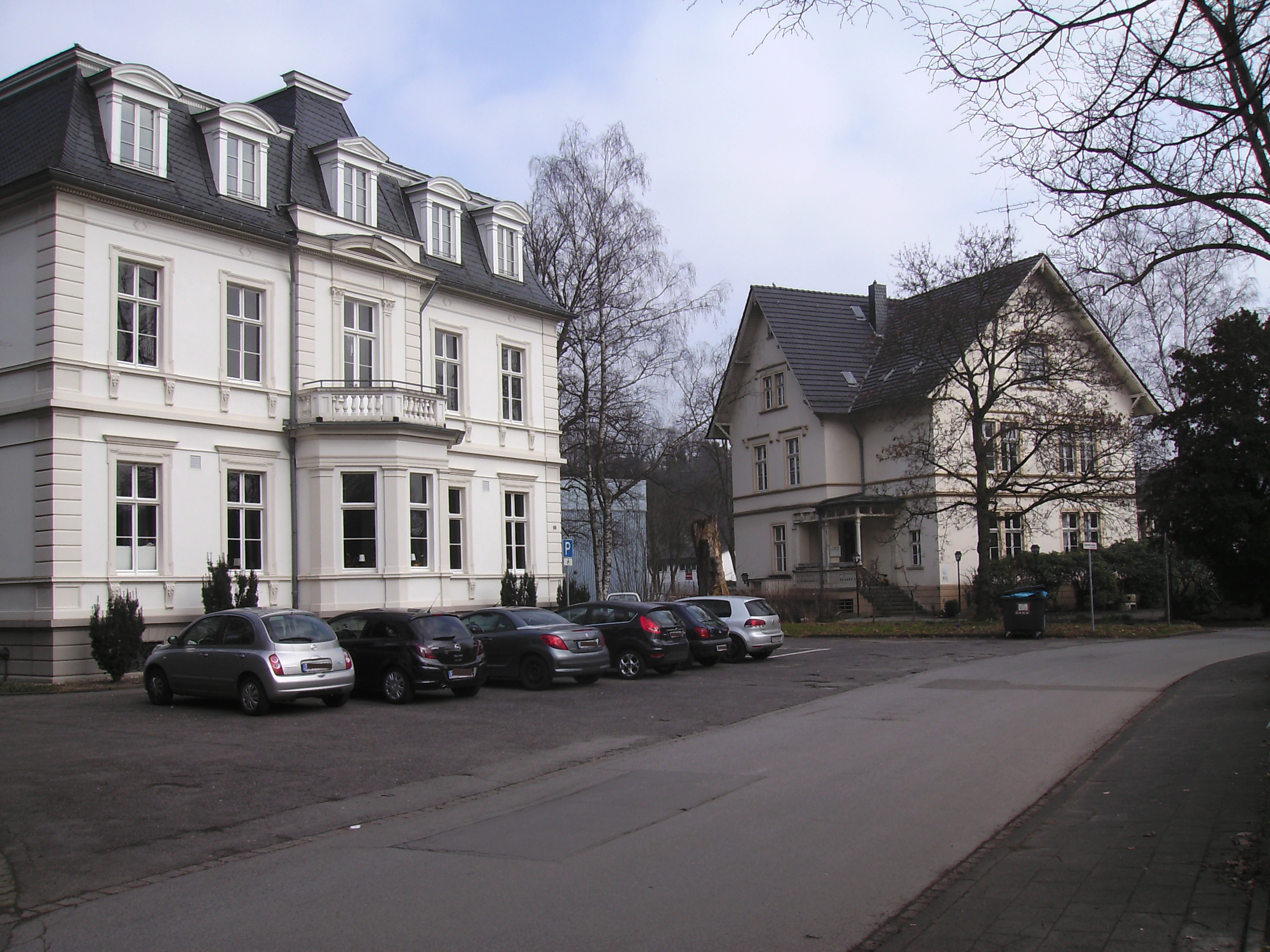 Zwei von ursprünglich drei Villen der Familie Weyermann, die in der zweiten Hälfte des 19, Jahrhunderts in Leichlingen (Rheinland) erbaut wurden. Das linke größere Gebäude Am Hammer 10 ist das "Bürgerhaus" der Stadt Leichlingen. Das kleinere Gebäude rechts (Am Hammer 9) befindet sich in Privatbesitz. Beide Häuser stehen unter Denkmalschutz.